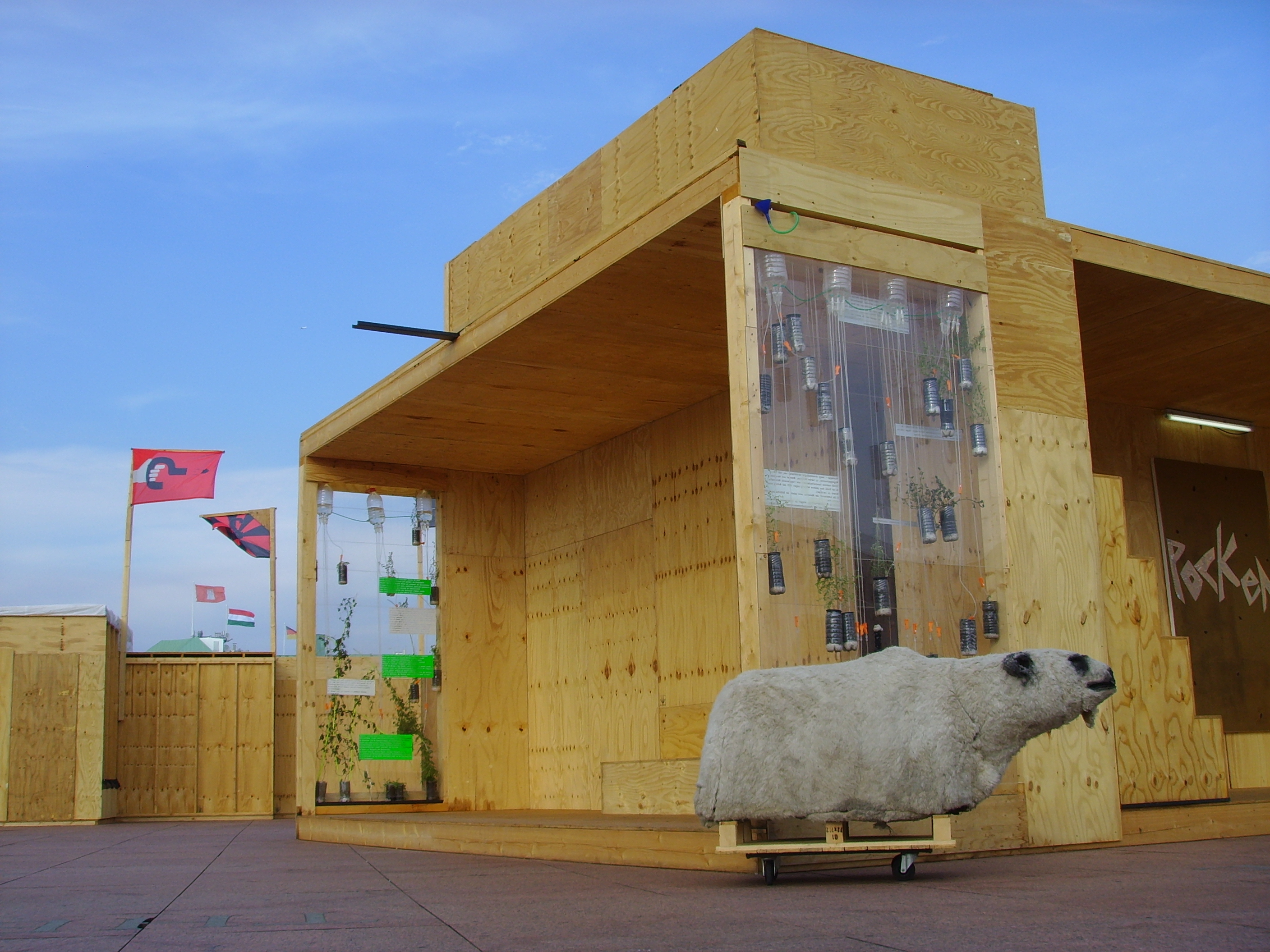 In der Zeit von 15. August bis 30. September baut die Künstlerkollektiv baltiv raw org auf dem Plateau der Hamburger Kunsthalle eine Kunststadt auf.